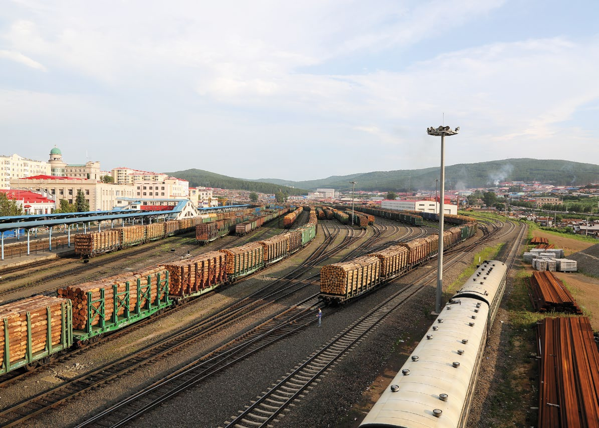 Сухопутный порт Суйфэньхэ